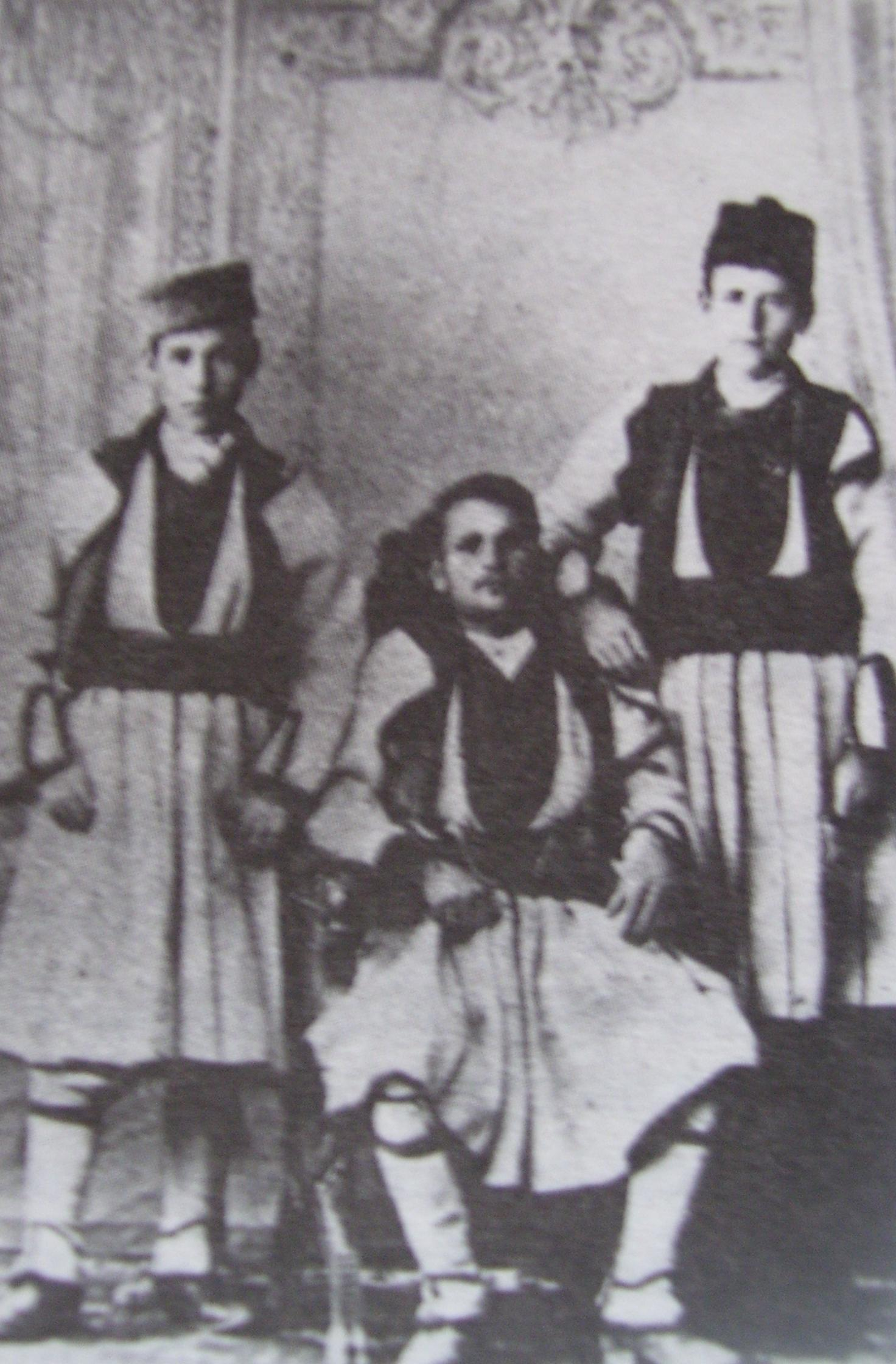 Димитър, Никола и Павел Чупарови